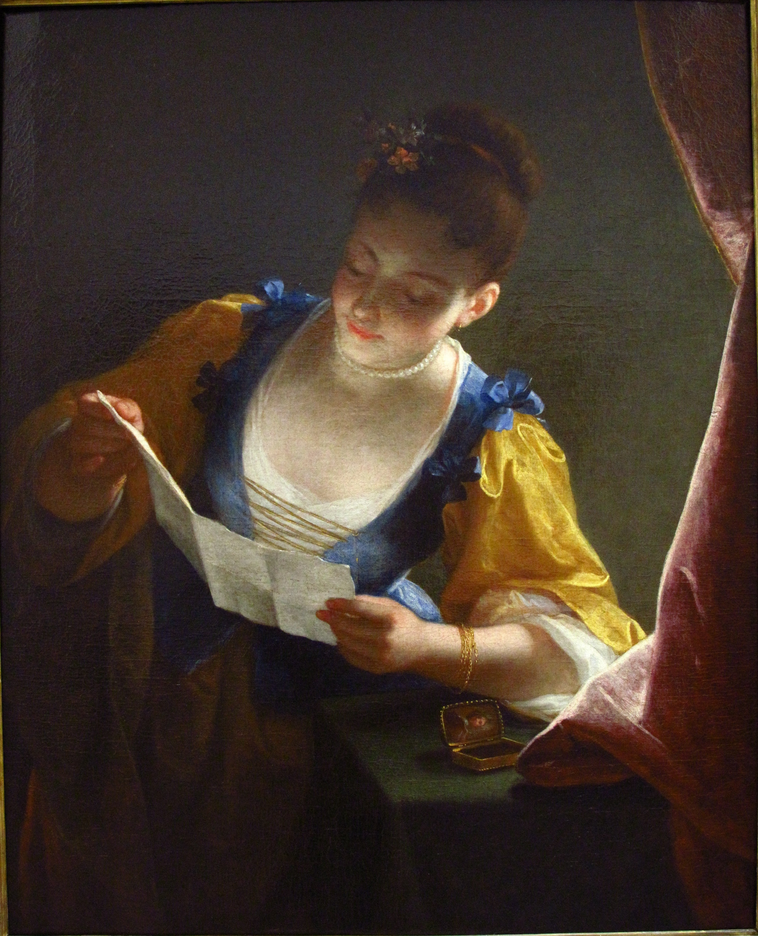 Jeune femme lisant une lettre